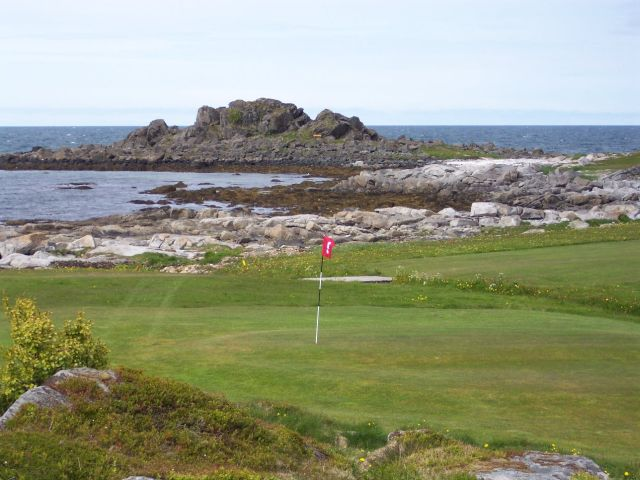 Golf de Lofoten, en bordure de mer